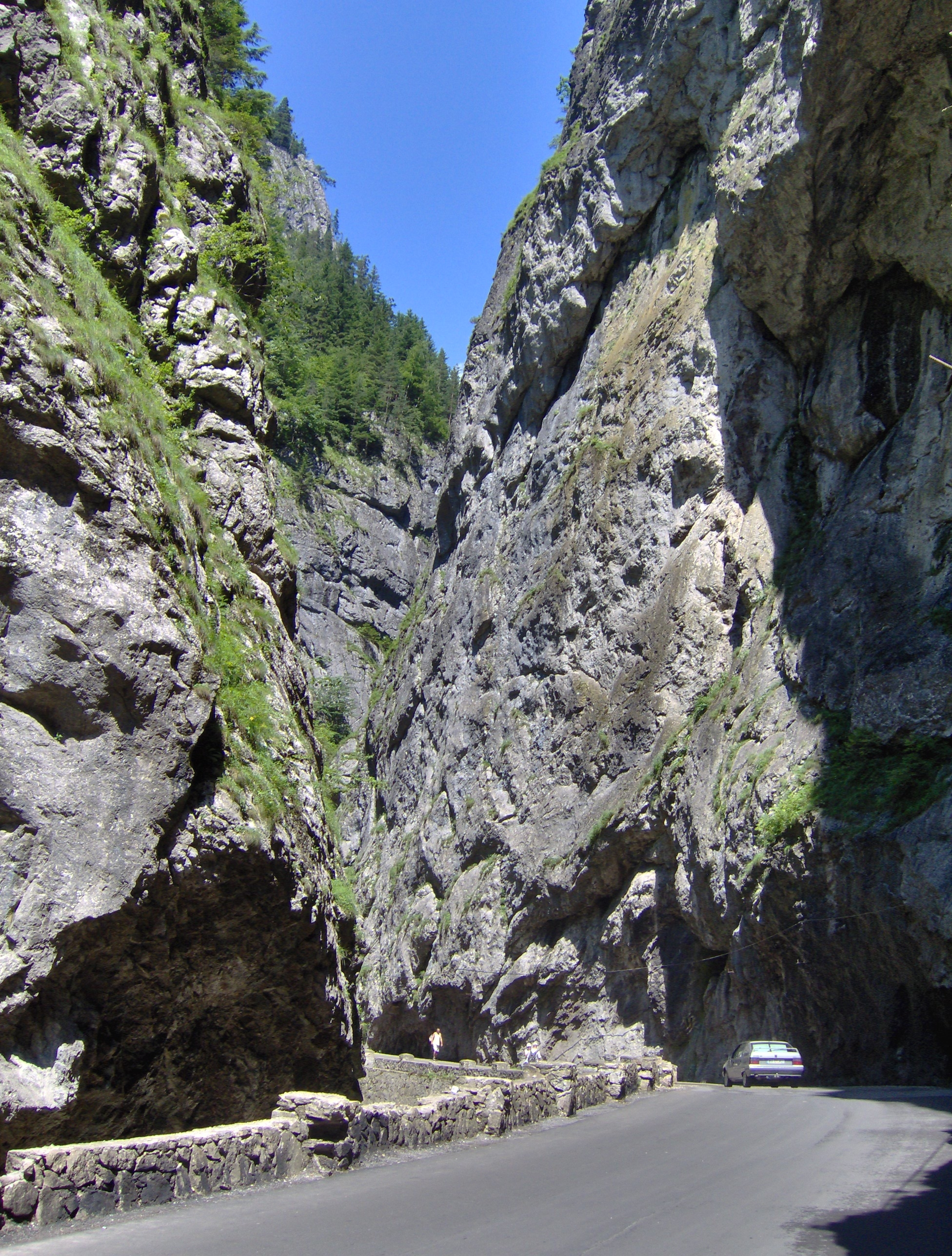 Cheile Bicazului, 2006